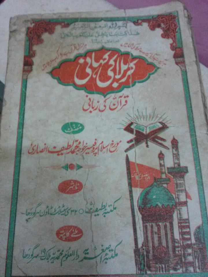 A picture of the book Karbala Ki Kahani, Quran Ki Zabani, by Khwaja Muhammad Latif Ansari.